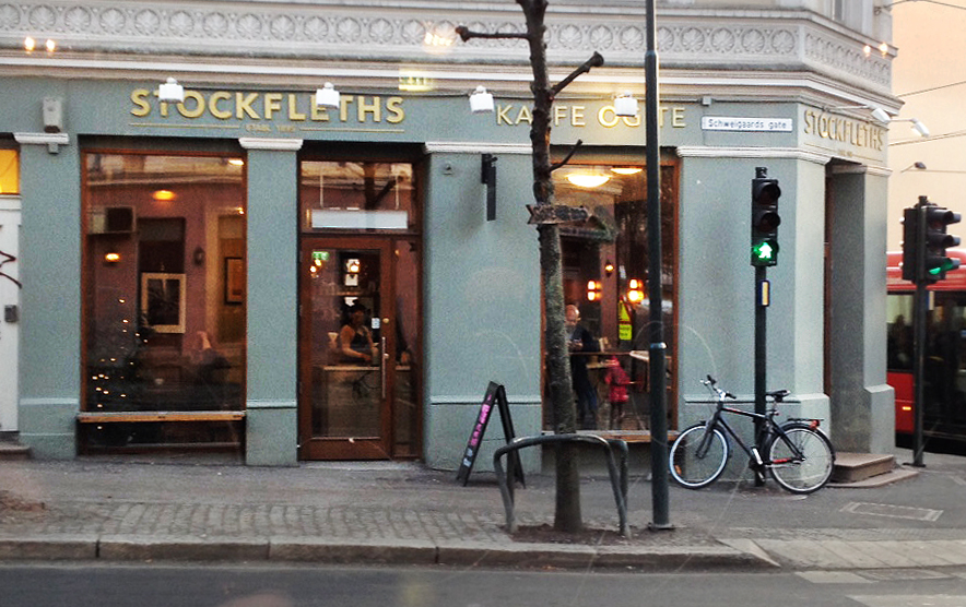 Stockfleths i Gamlebyen i Oslo 2016. Adresse: Munkegata 2, inngang på hjørnet Schweigaards gate/Oslo gate.